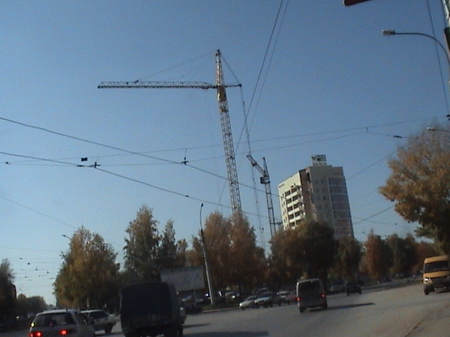 Краны КБ-503Б и КБ-403Б - на строительстве дома Блюхера 71б